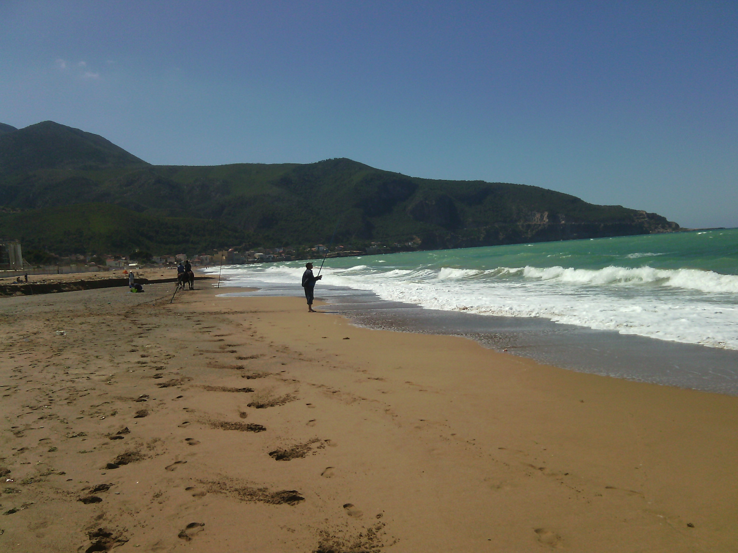 la plage de chenoua wilaya de tipaza.